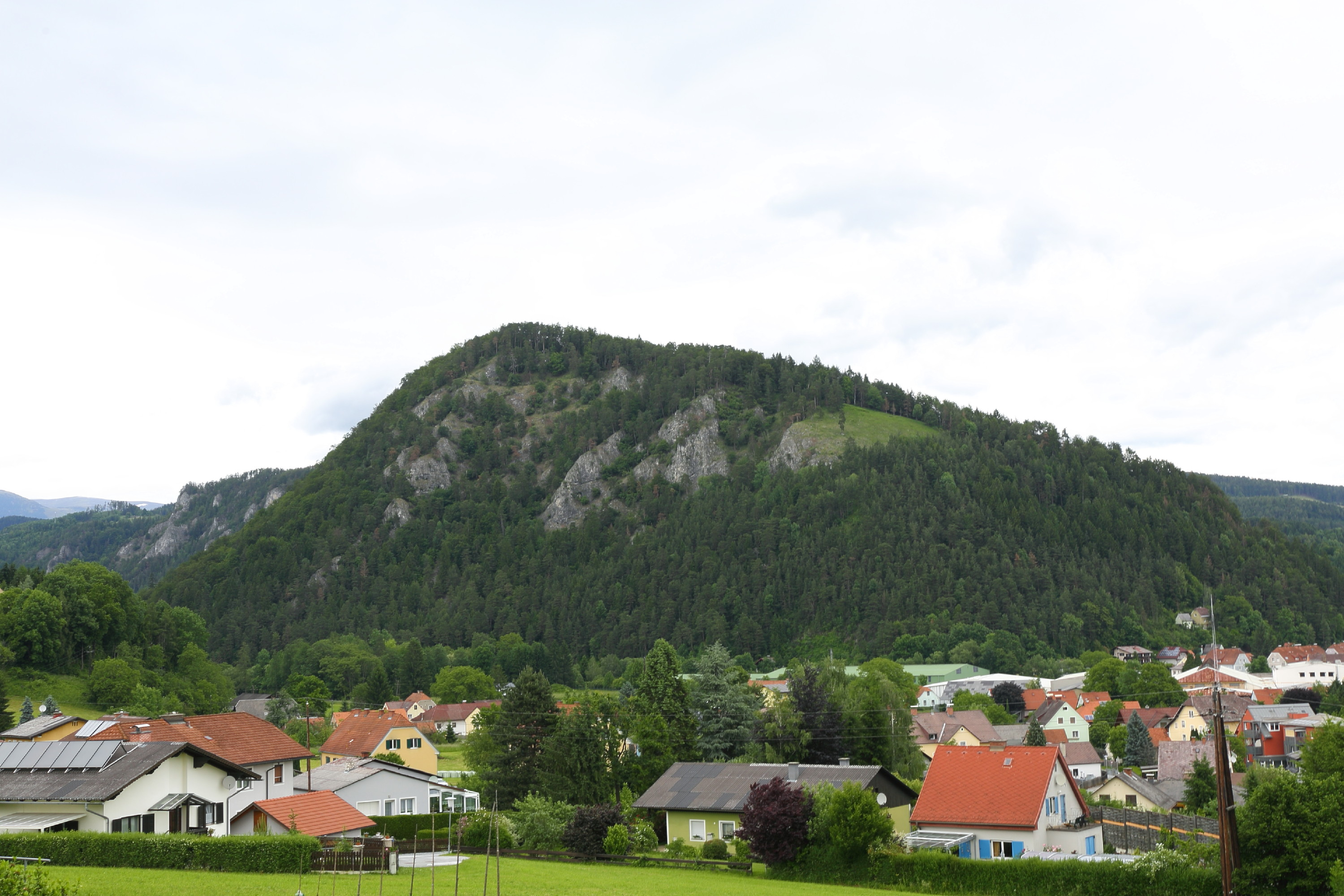 Zigöllerkogel in Köflach This media shows the nature reserve in Styria with the ID NSG 43 c.